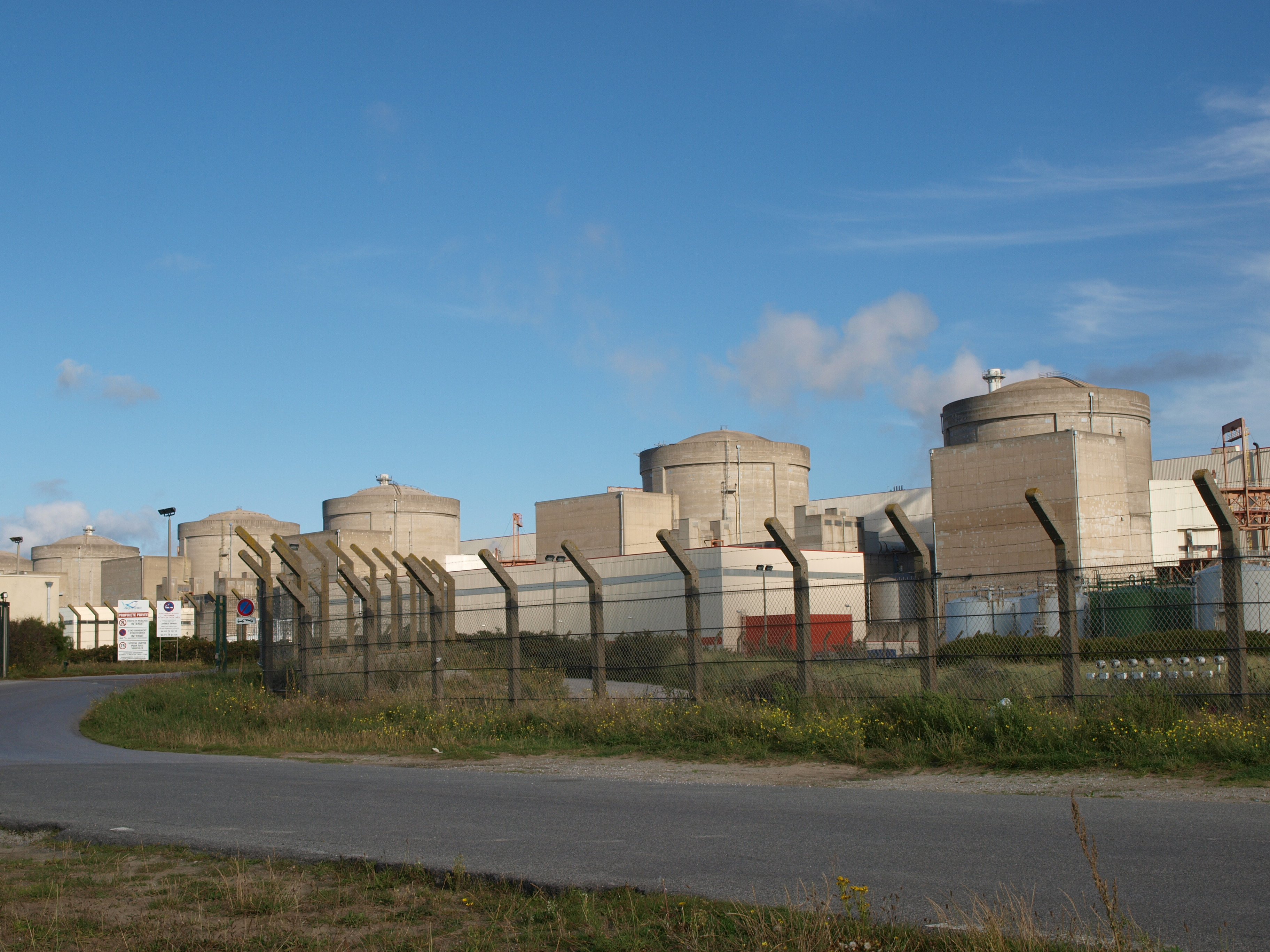 La centrale EDF